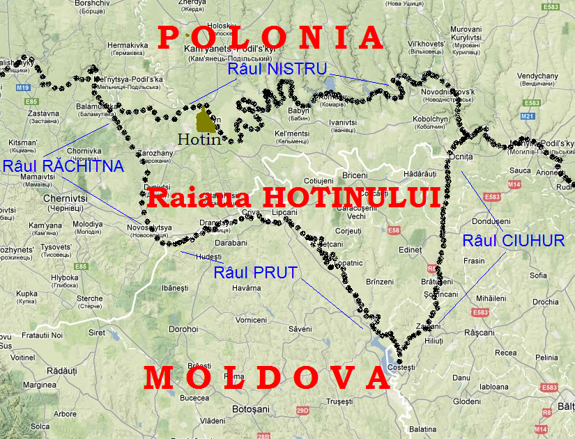 Harta raialei Hotinului (1715-1806) conform descrierii făcute de Ion Nistor în Istoria Românilor